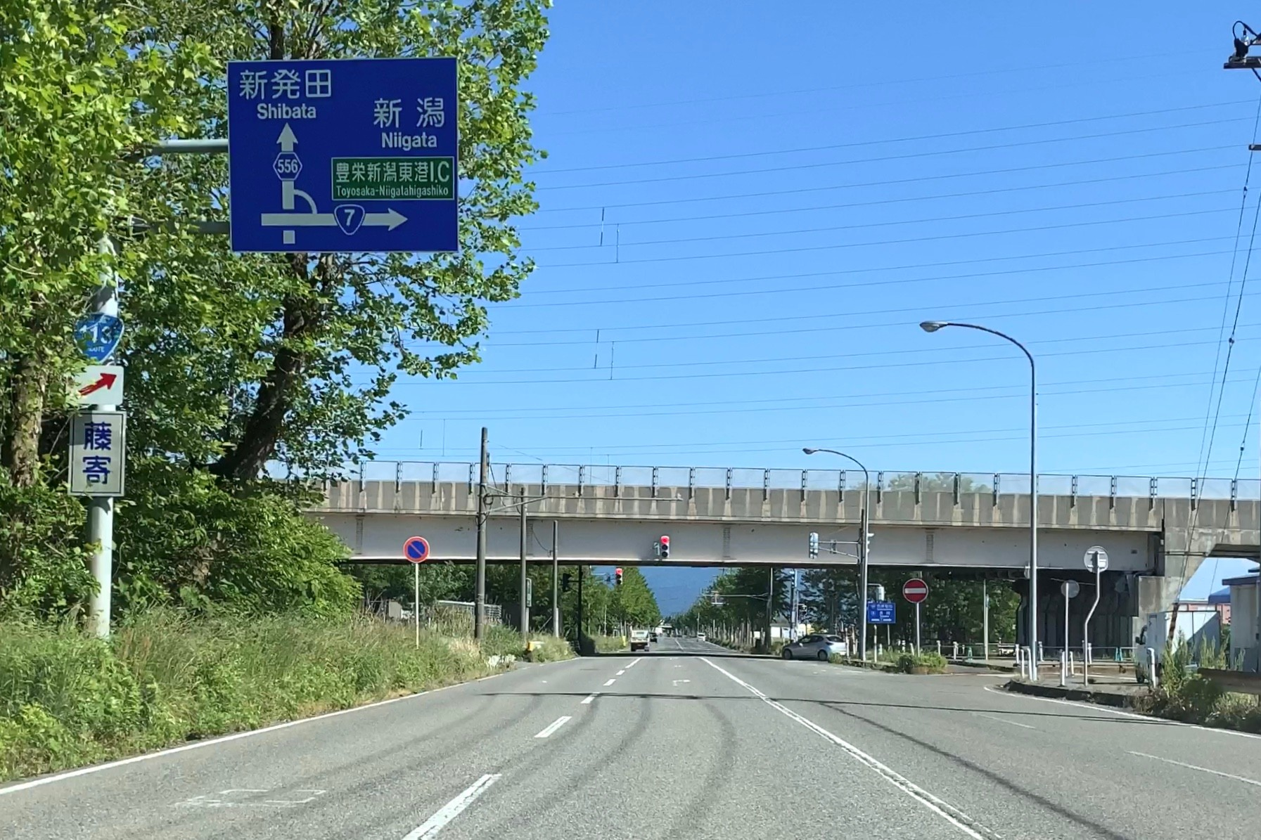 新潟県道556号新潟東港線・新新バイパス 東港インターチェンジ（2020年5月）